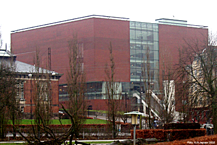 Kunstmuseet Aros i Århus, Denmark